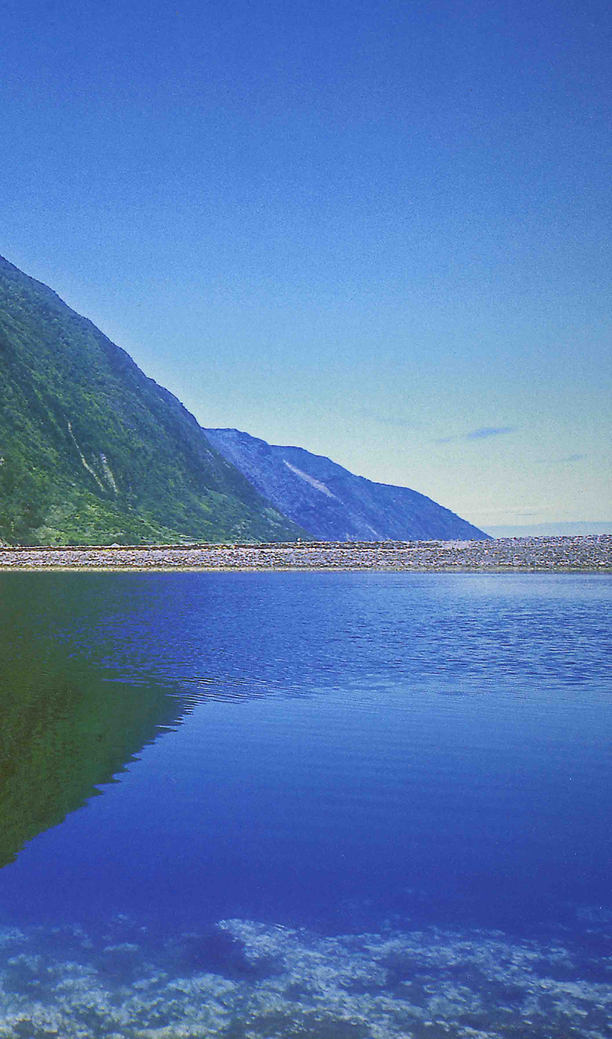 Lagoa da Fajã dos Cubres, Calheta, ilha de São Jorge, Açores, Portugal.